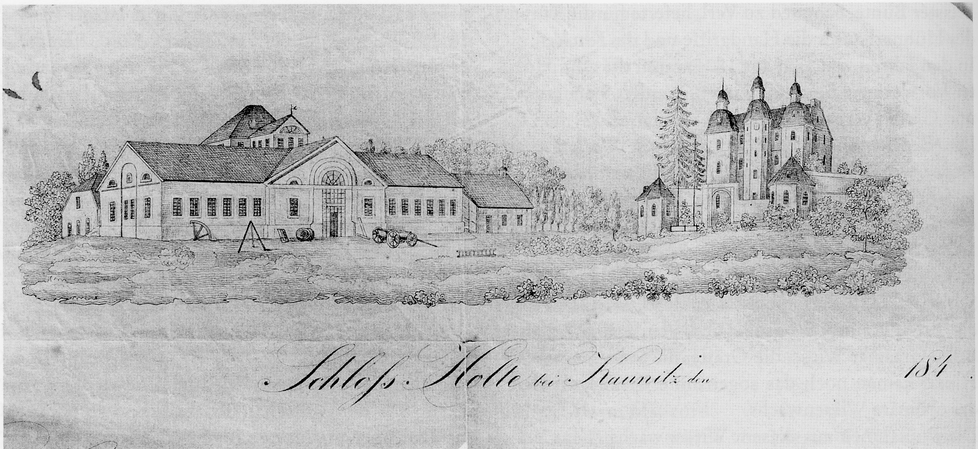 Grafik des Schlosses Holte mit der Holter Eisenhütte